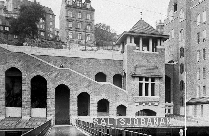 Saltsjöbanan Slussen, Lokattens trappor